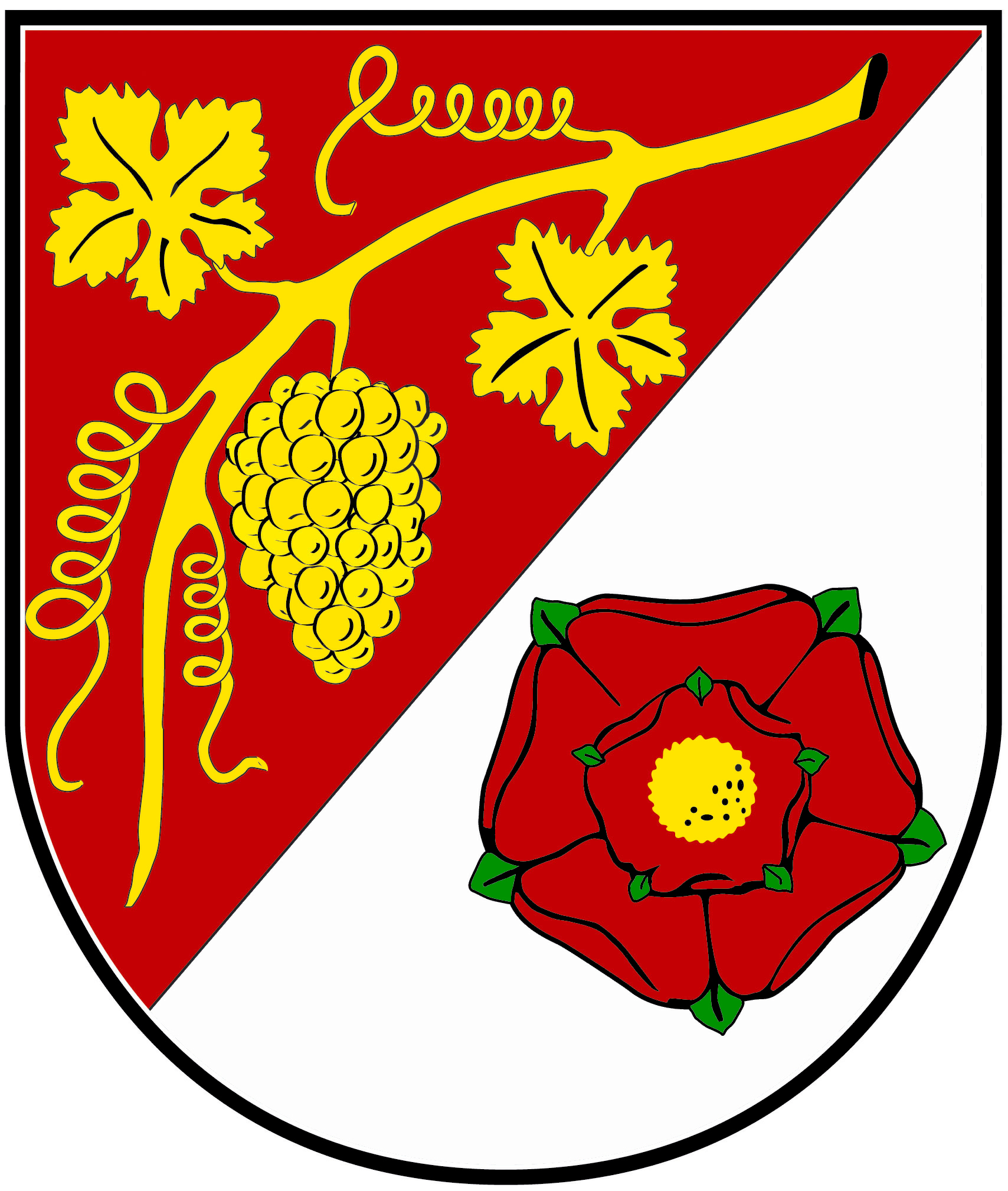 Wappen der Ortsgemeinde Irsch